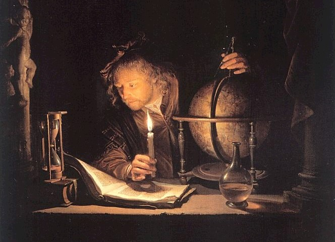 "Astronomer-by-candlelight" של Dou גירסת רוחב של התמונה